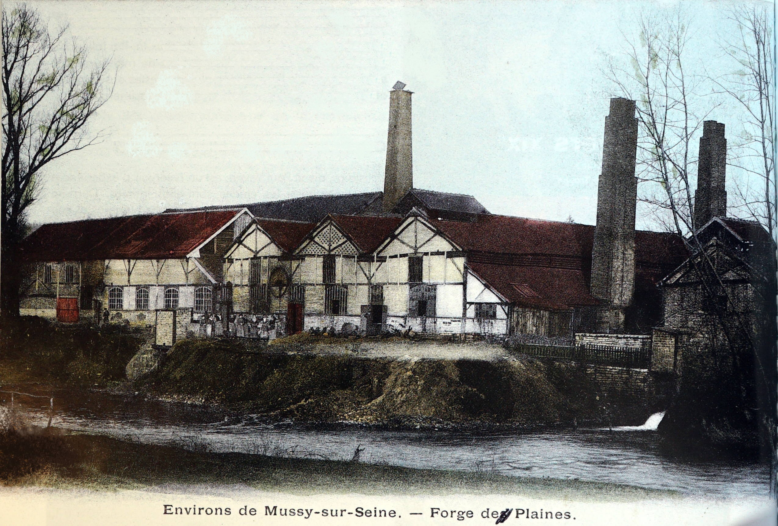 sur une vue ancienne.